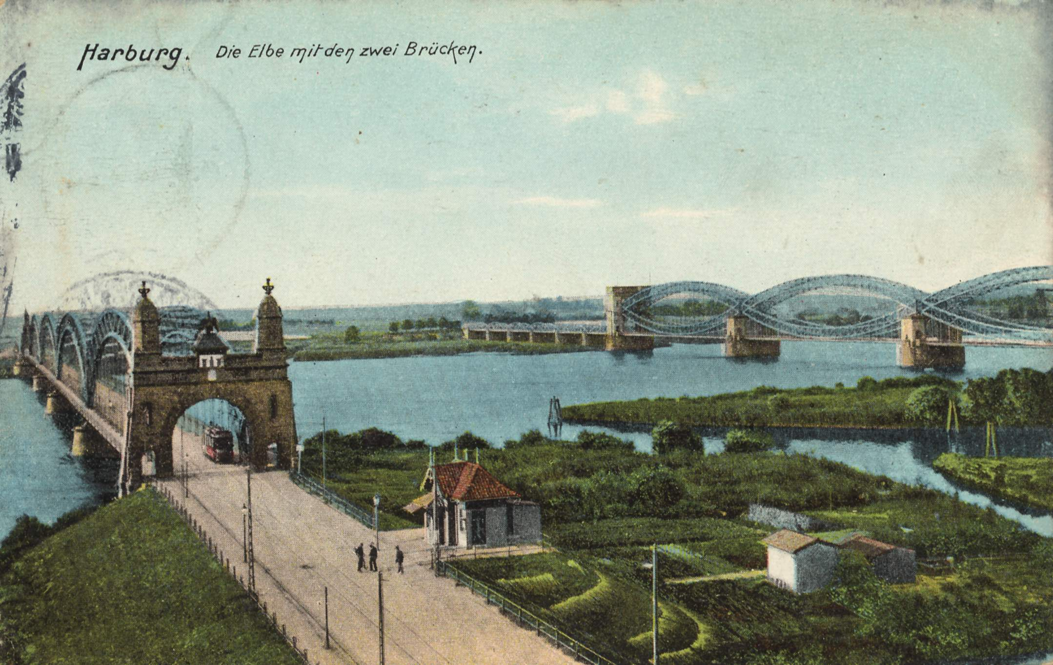 Die Elbe mit den zwei Brücken